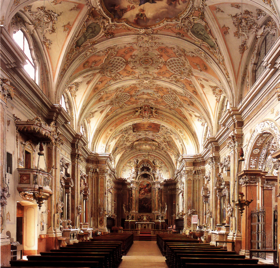 Villa Lagarina, interno della Pieve di santa Maria Assunta